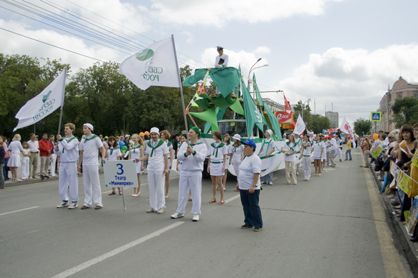 Парад в Тюмени в честь Дня города